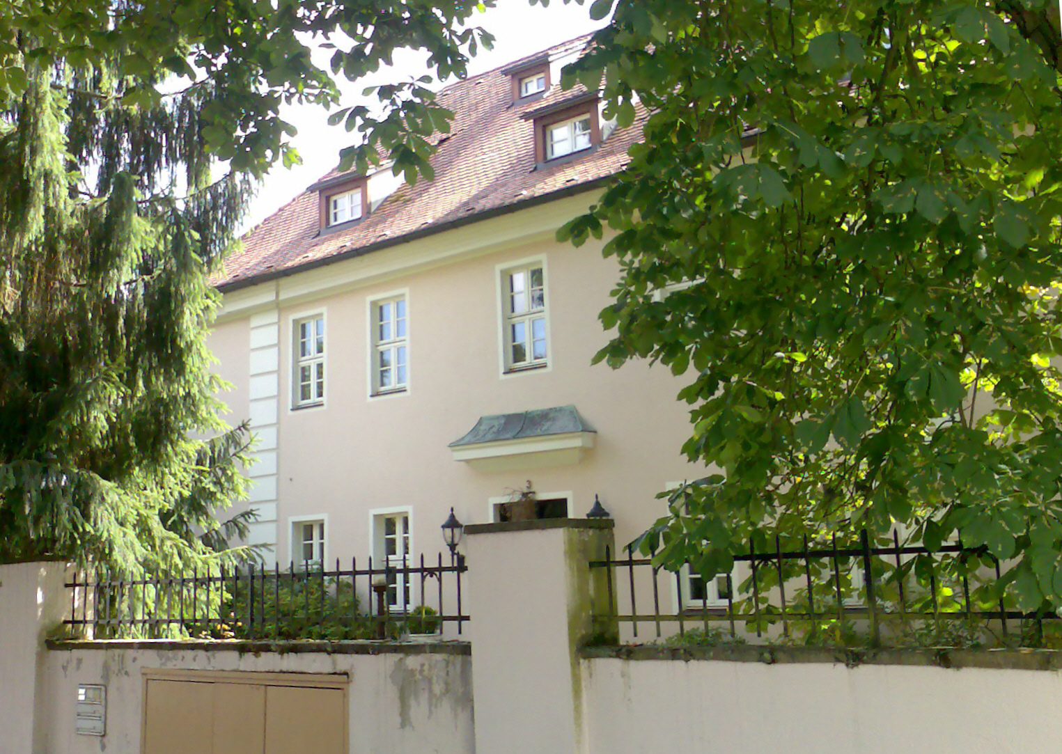 Herrensitz Weiherhaus in Nürnberg Weiherhaus - Nordseite